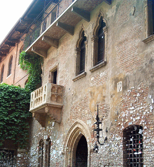 Balkon der Julia (Romeo und Julia) in Verona (Italien)